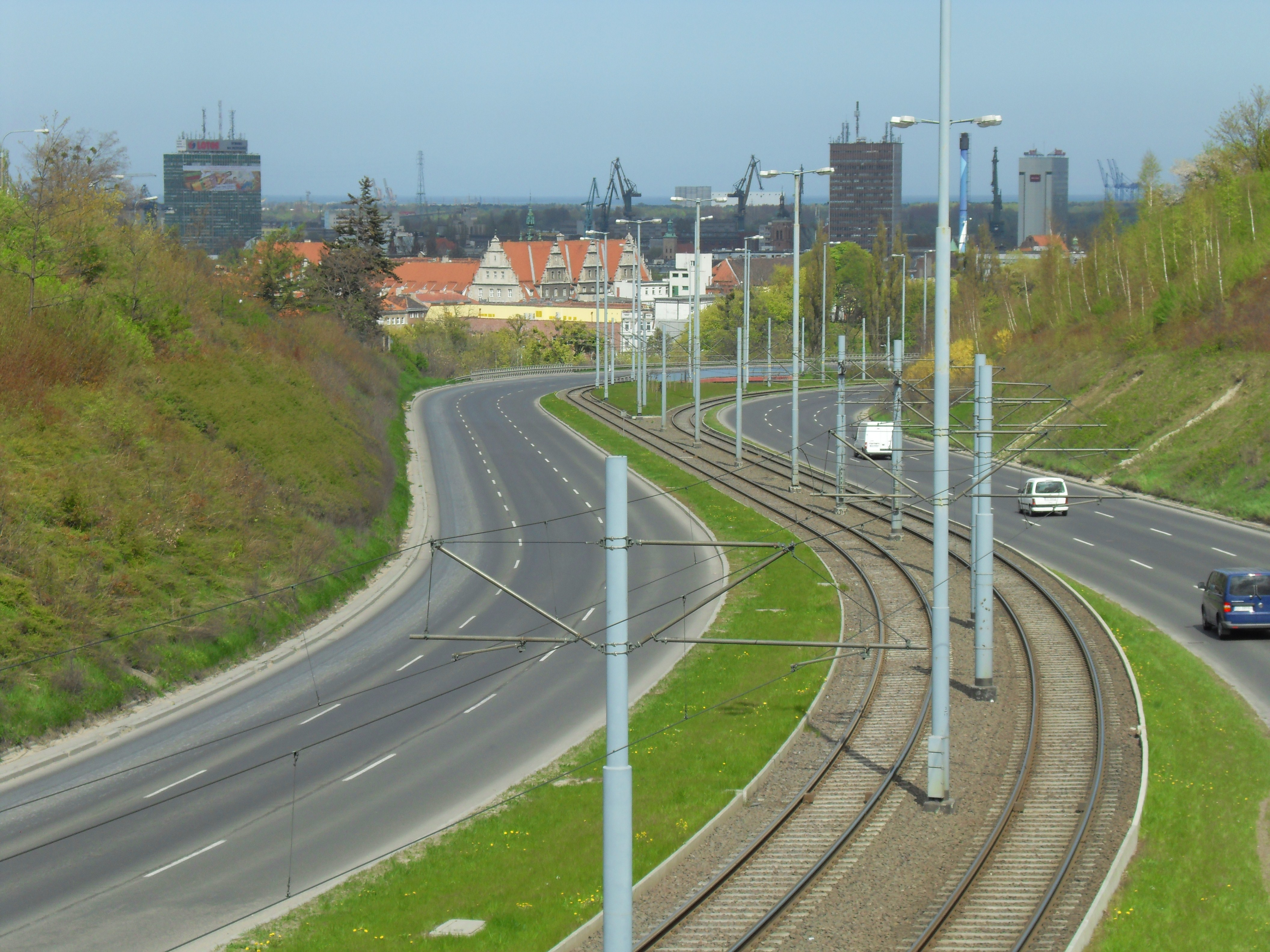 Trasa W-Z w Gdańsku, na granicy dzielnic Siedlce (po lewej) i Chełm (po prawej).